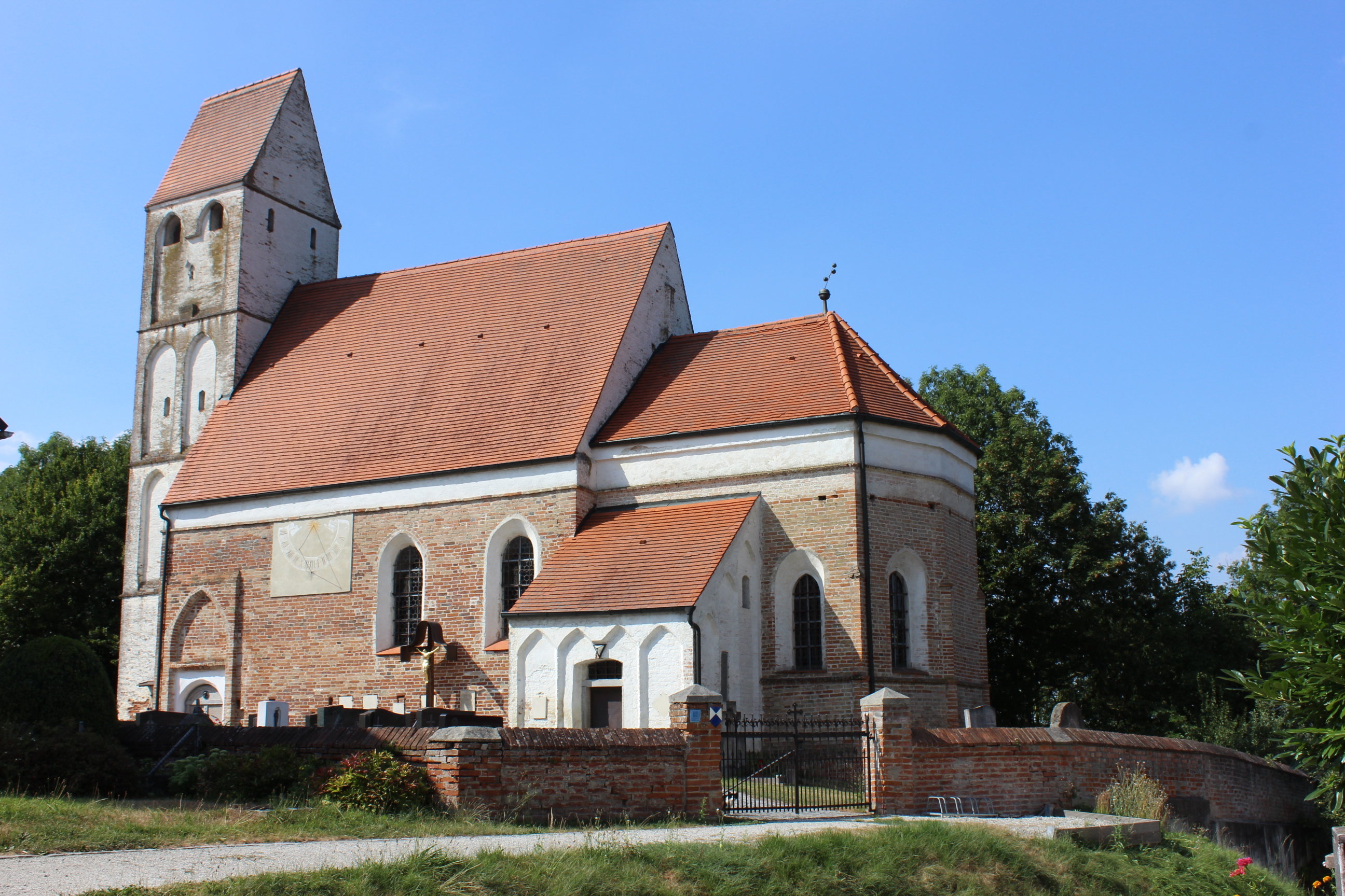 Katholische Filialkirche St. Johannes der Täufer in der Mamminger Str. 62 in Usterling, Stadt Landau a. Isar; Niederbayern.This is a photograph of an architectural monument.